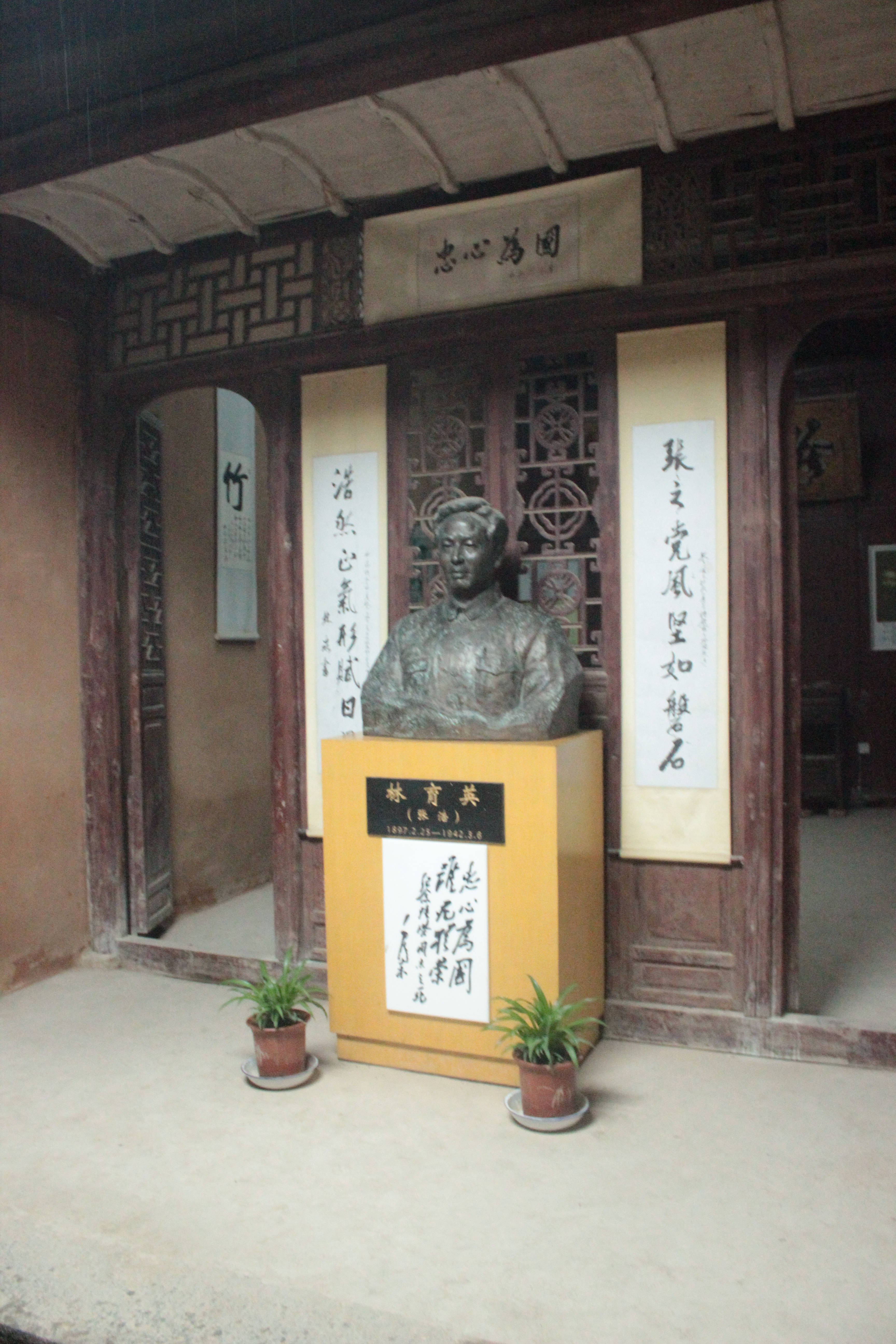 林家大湾 林彪故里